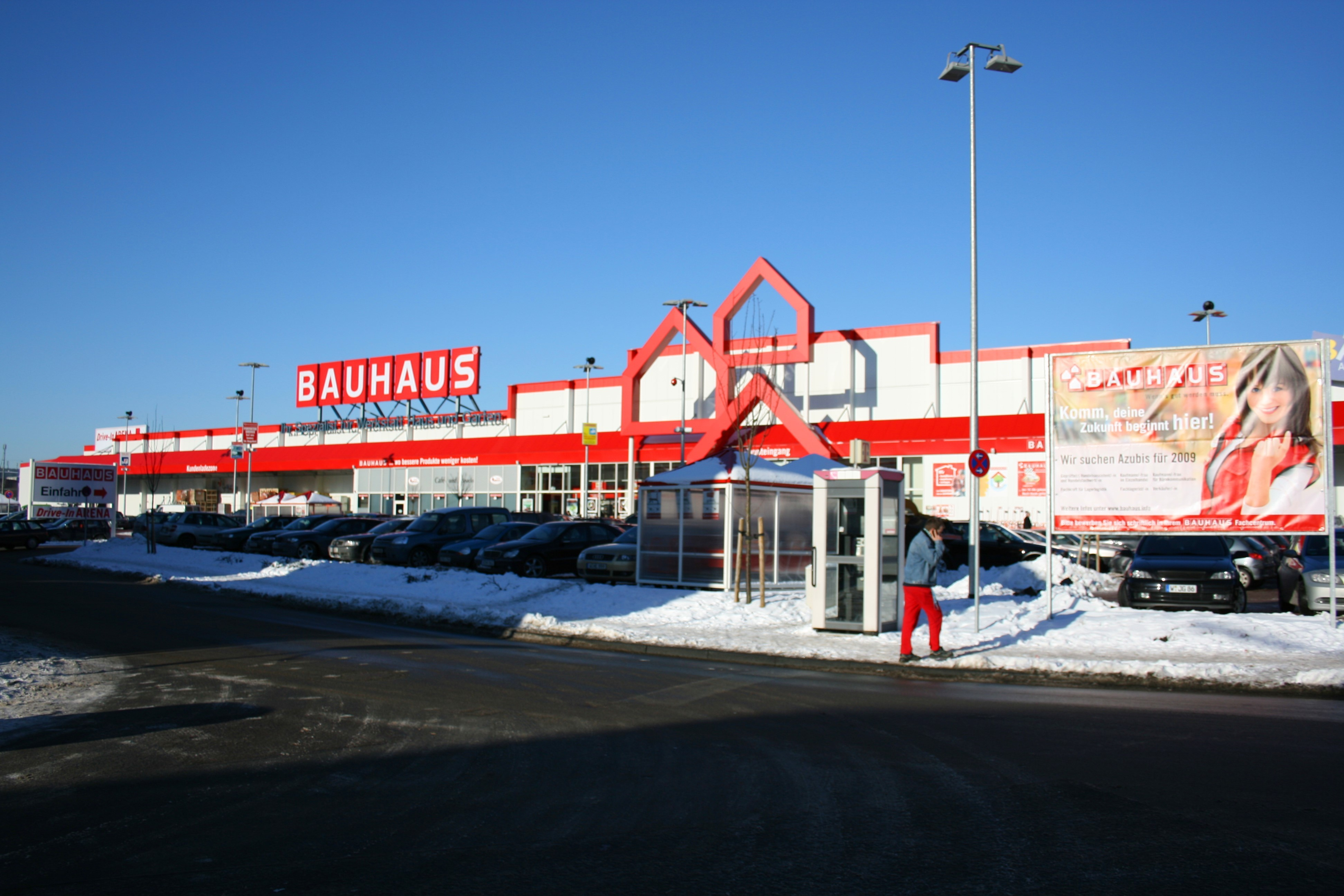 Bauhaus in Wuppertal